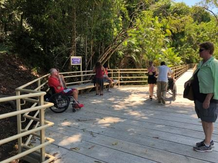 Sendero Universal. Parque Nacional Manuel Antonio, Costa Rica. Obra del arquitecto Ibo Bonilla